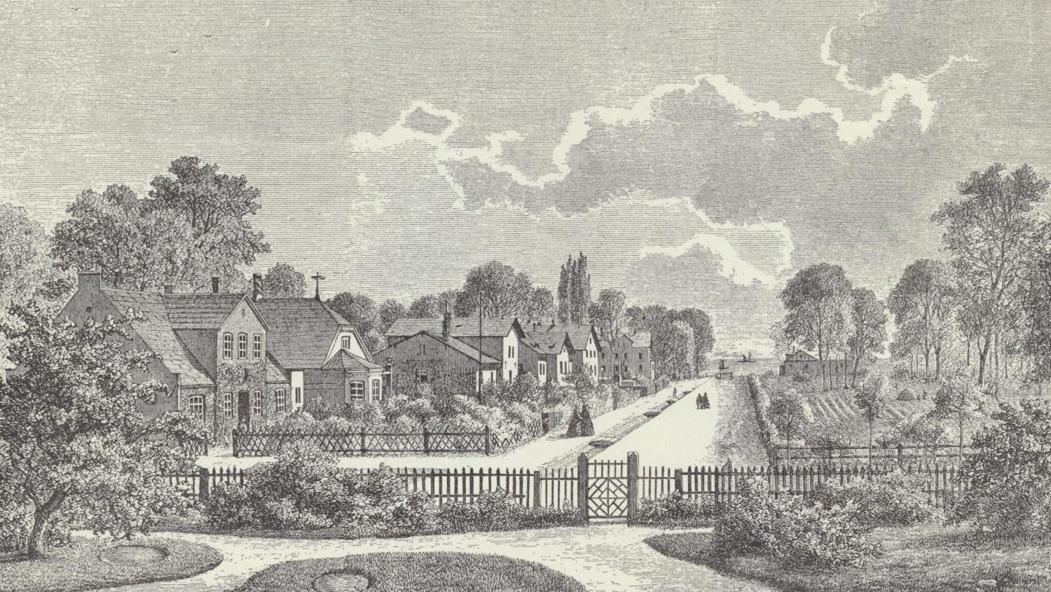 Prospect af Rosenvænget ved Kjøbenhavns Østerbro / del. Emil Libert, 1863.